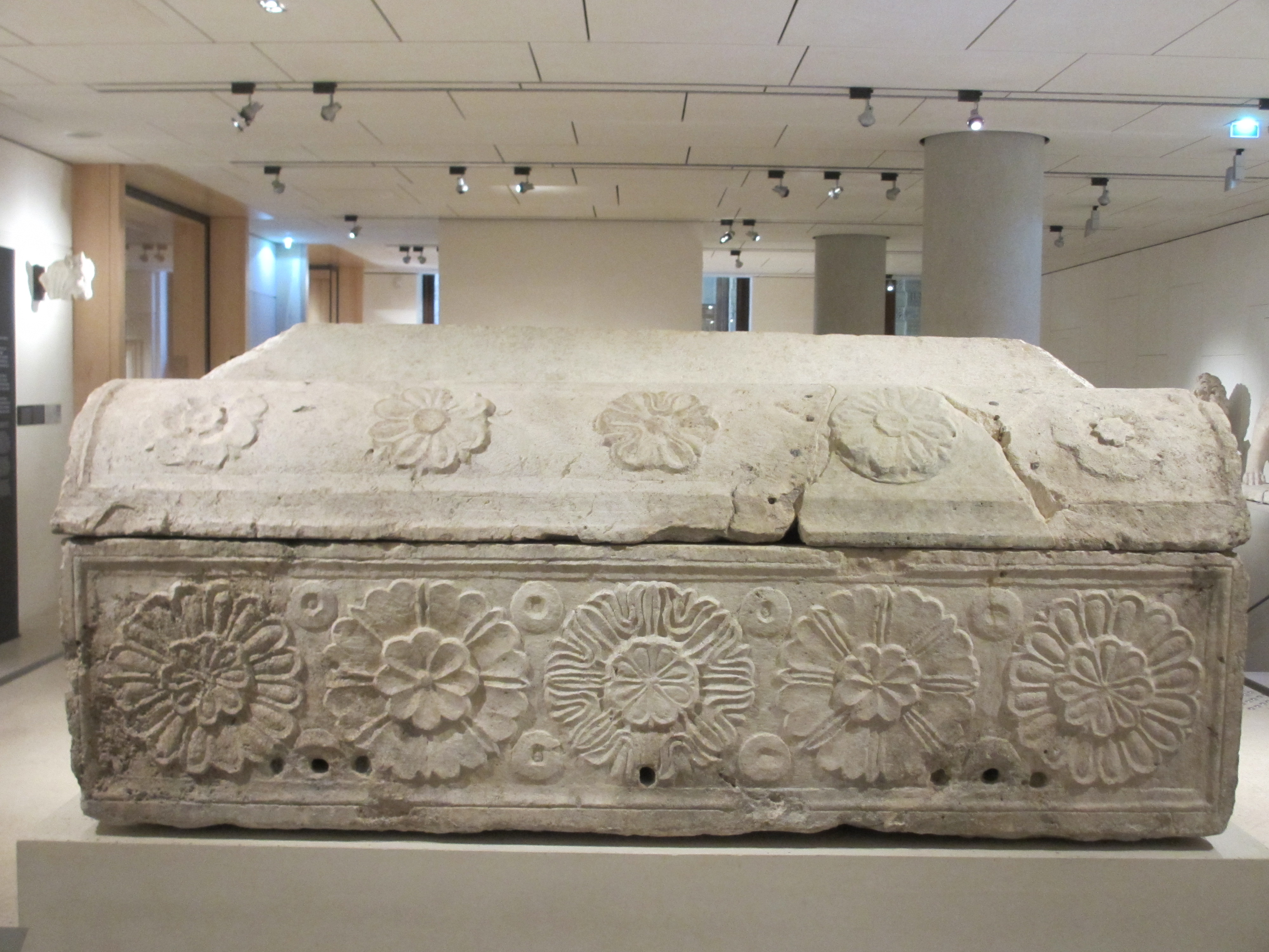 Parmi les sarcophages découverts dans les décombres du Tombeau des Rois, celui-ci est le plus complet. Sa cuve avait été déplacée, percée de trous d’évacuation et utilisée comme bassin. De forme traditionnelle, avec un couvercle arrondi, il porte un magnifique décor de larges rosettes aux feuilles épaisses. D’après les fragments découverts (comme le fragment de couvercle AO 5046), une série de sarcophages de ce type devait reposer dans le tombeau.